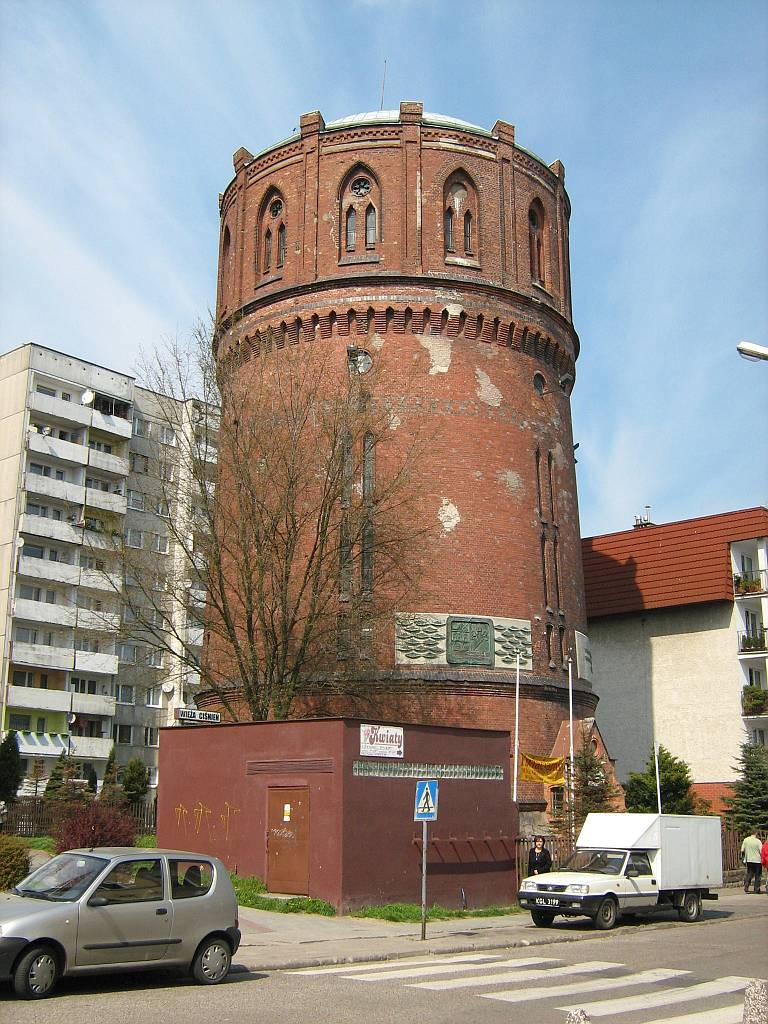 Kołobrzeg. Wieża ciśnień w centrum miasta. Widok od strony południowej.